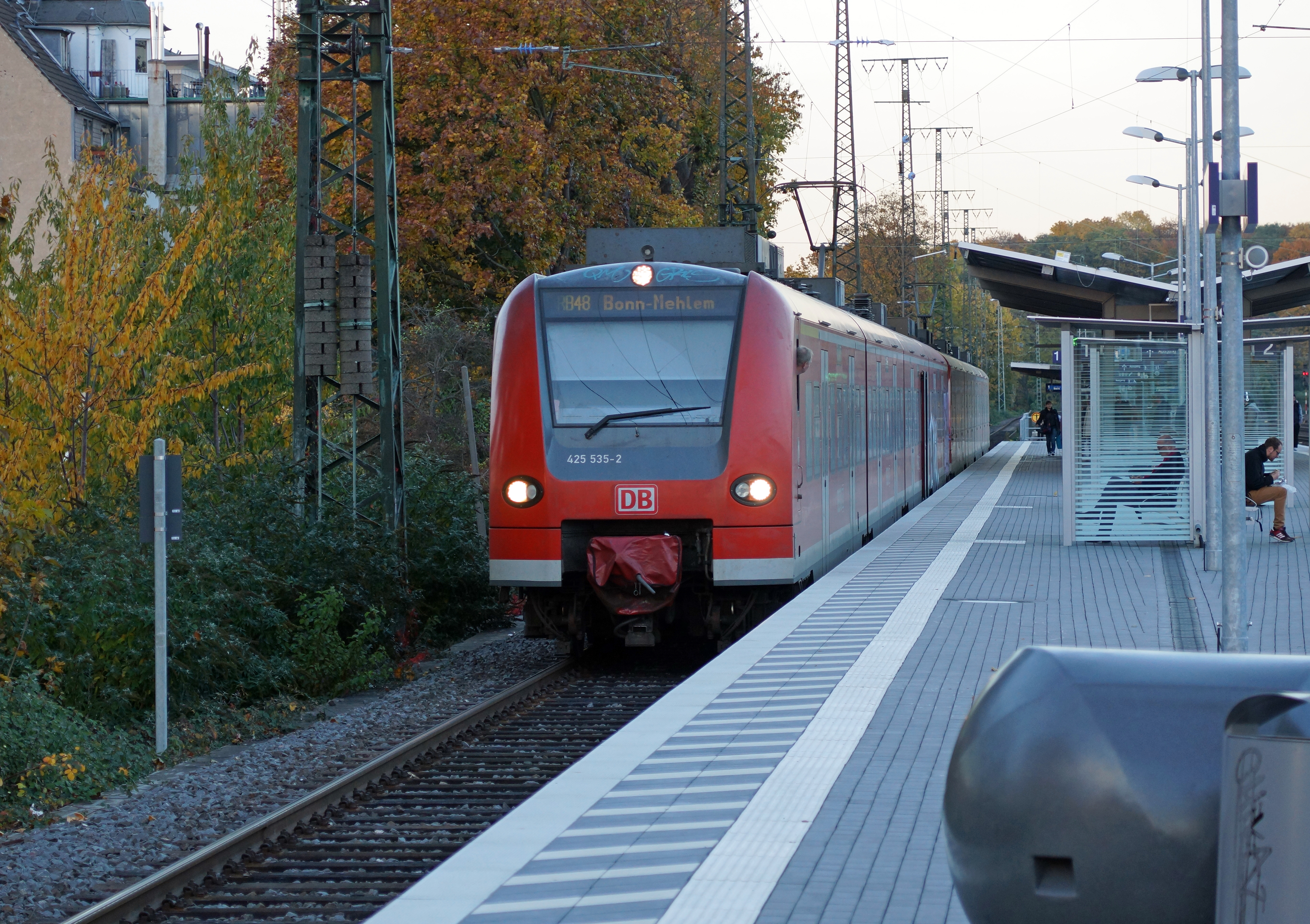 DBAG 425 535-2 im Bahnhof Köln-West.